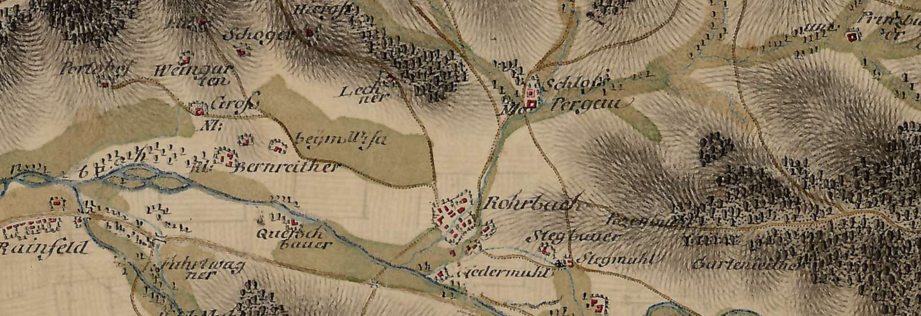 Rohrbach an der Gölsen auf einer Karte der Josephinischen Landaufnahme